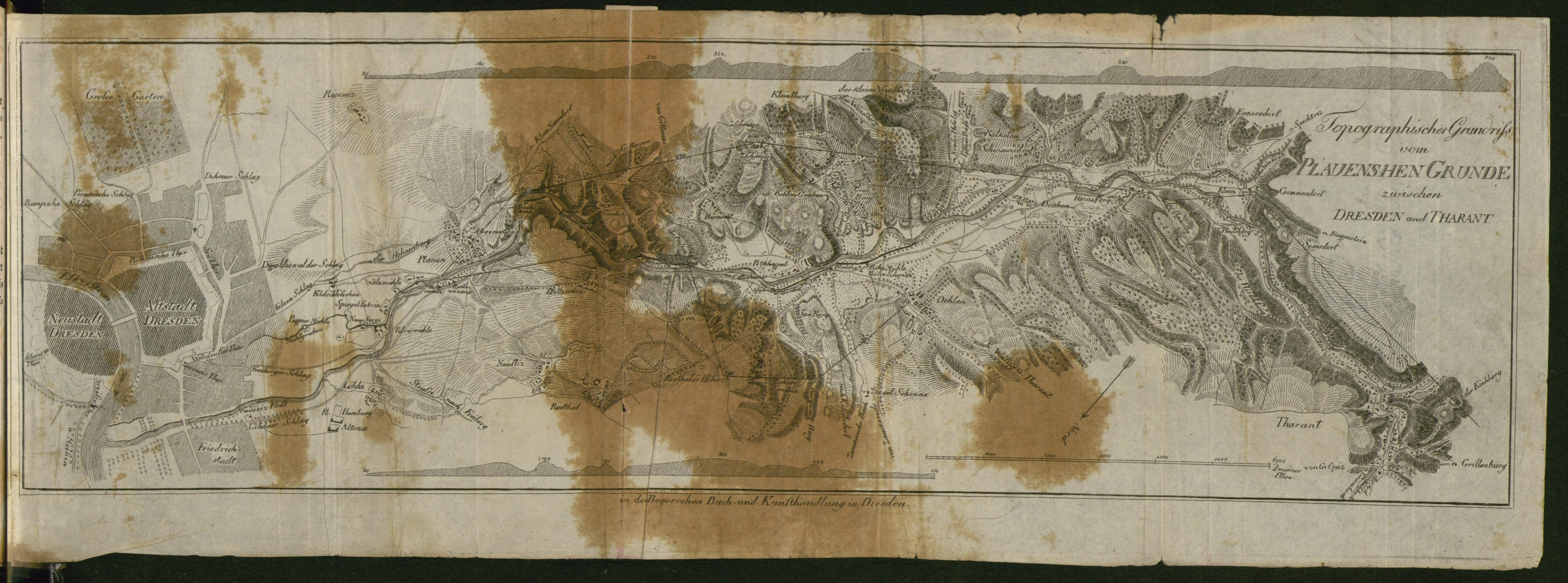 Beschreibung des Plauenschen Grundes, des Badeorts Tharant und seiner Umgebungen,ein kurzer unterhaltender Wegweiser für Naturfreunde, welche diese Gegenden genußvoll besuchen und angenehme Erinnerungen davon behalten wollen.